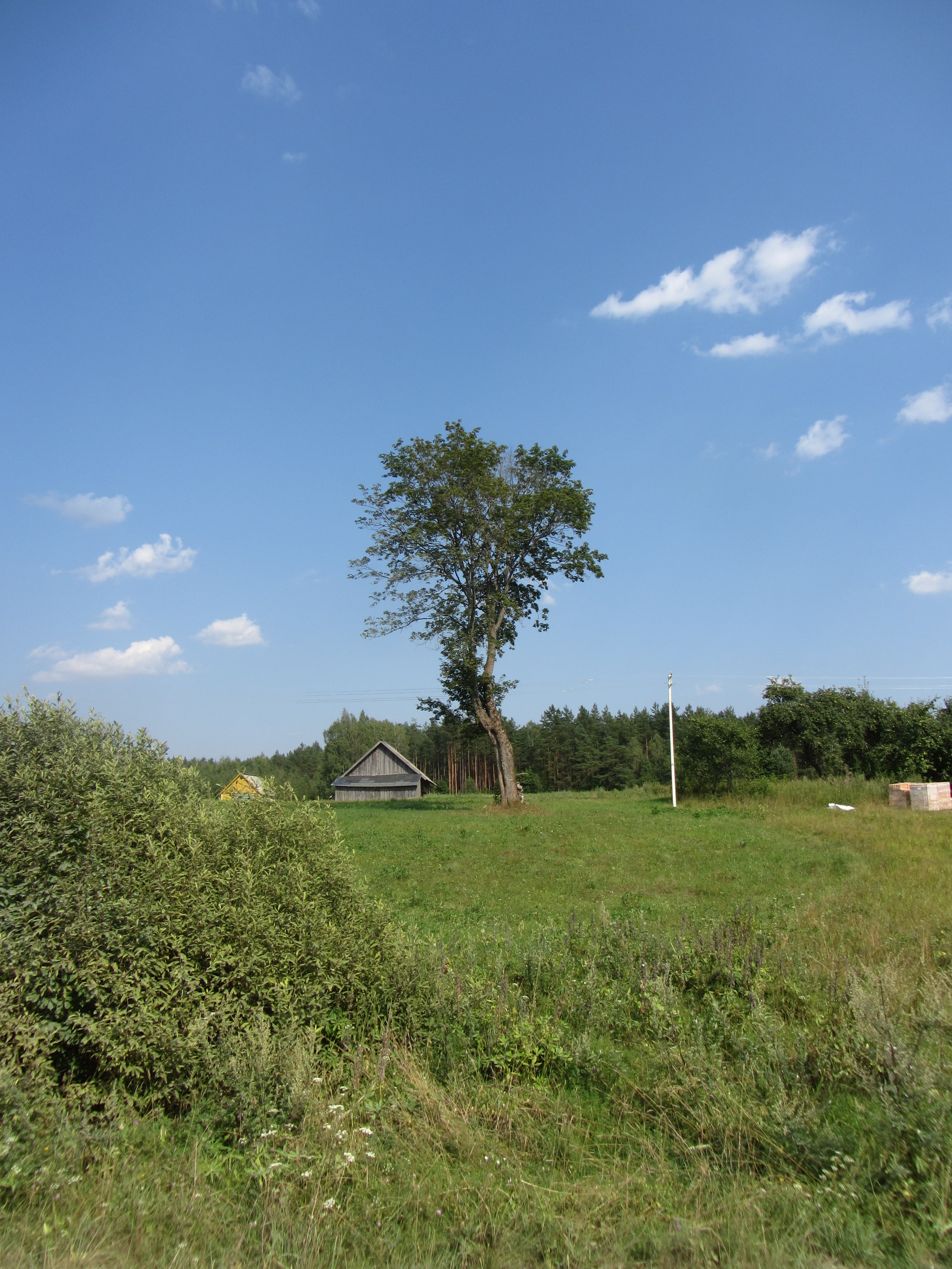 Labanoro sen., Lithuania